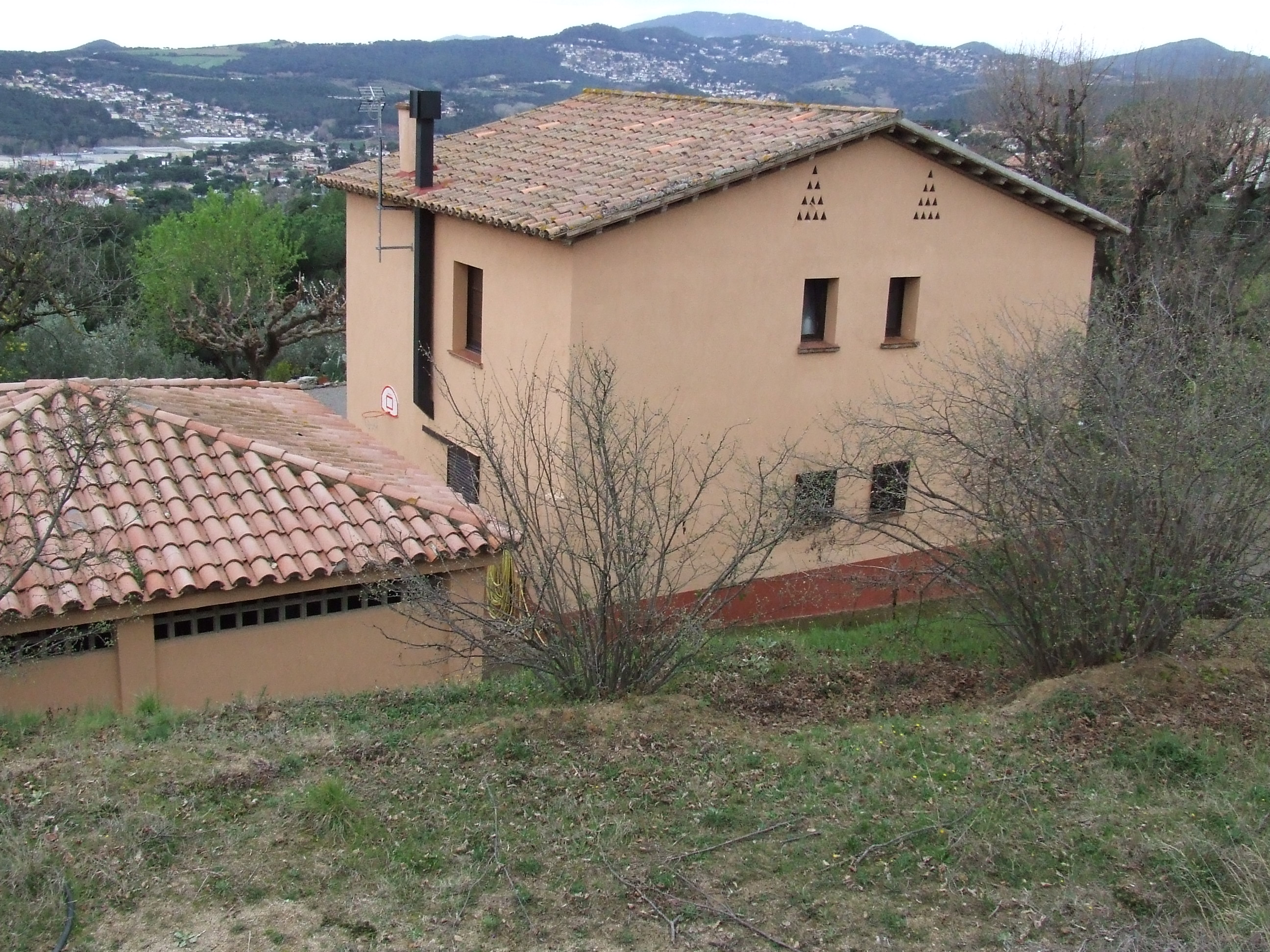 Can Bonrepòs (Bigues, Bigues i Riells, Vallès Oriental)